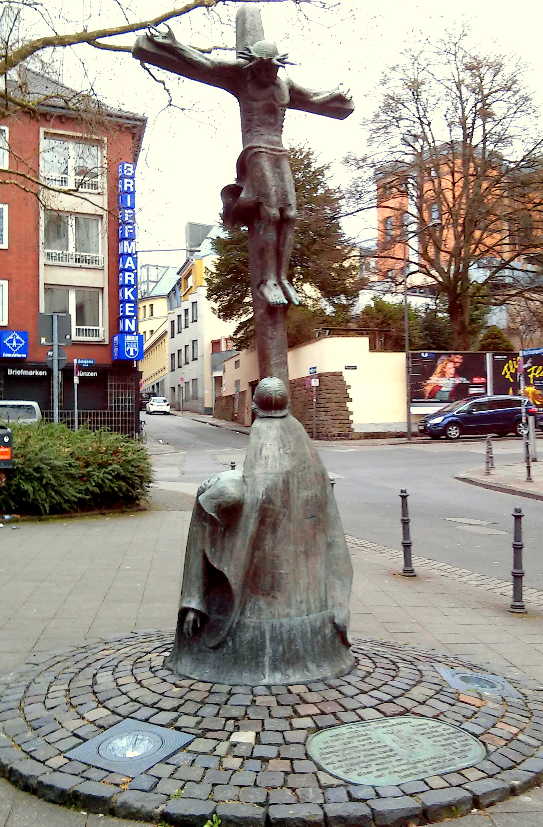 Kreuzigungsgruppe Aachen von Bonifatius Stirnberg